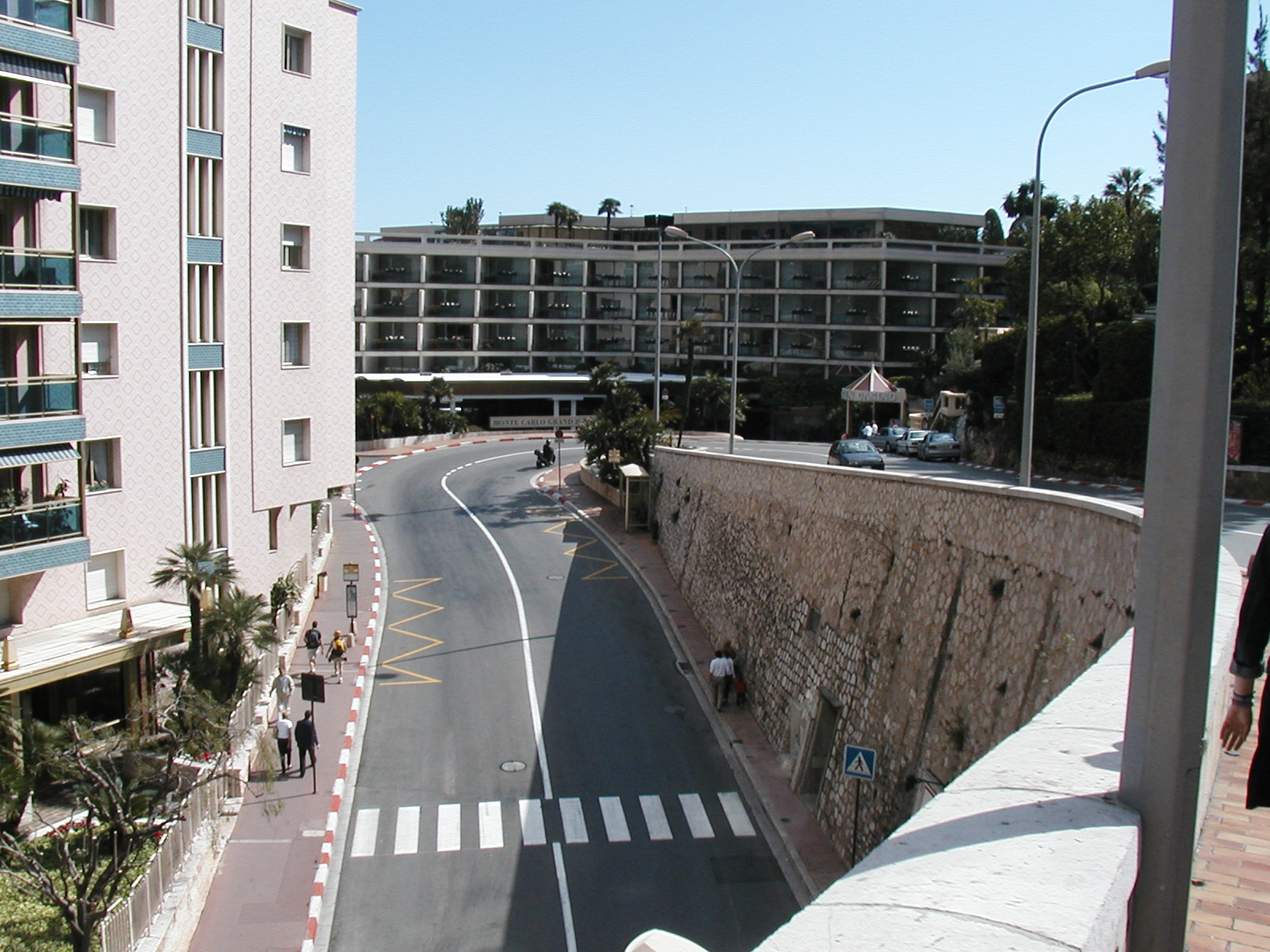 Circuit de Monaco riviera, Monte Carlo